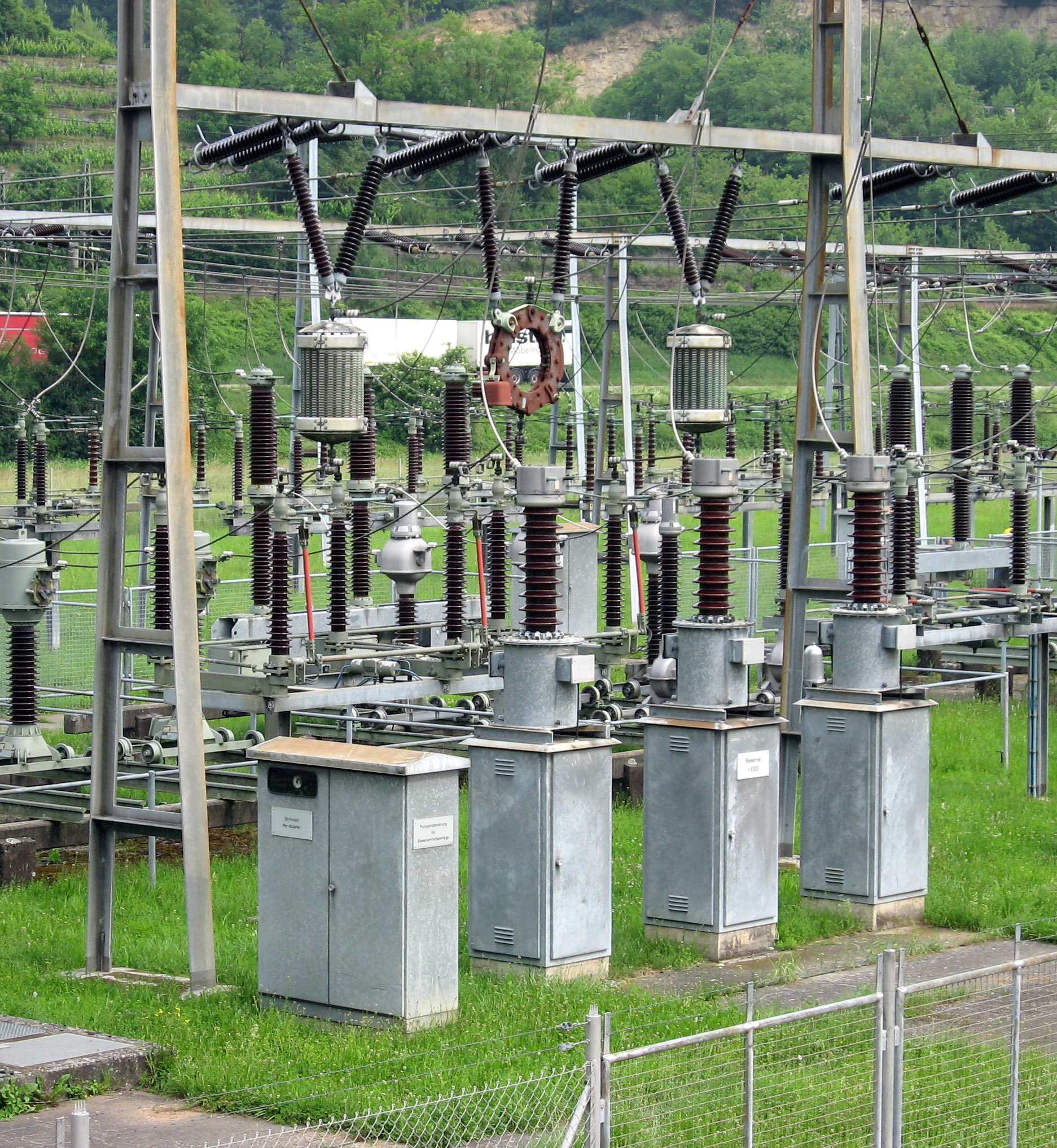 110-kV-Umspannwerk Enzberg in Mühlacker: Ankopplung der Trägerfrequenz-Nachrichtenübertragung über Hochspannungsleitungen (TFH) in einer 110-kV-Schaltanlage: in den drei Leitern befinden sich zwei Drosseln in Zylinder- und eine in Ringbauform. Darunter sind die drei Ankopplungskondensatoren sichtbar. Von den Verknüpfungspunkten Drossel-Kondensator verläuft nach oben die abgehende 110-kV-Leitung.